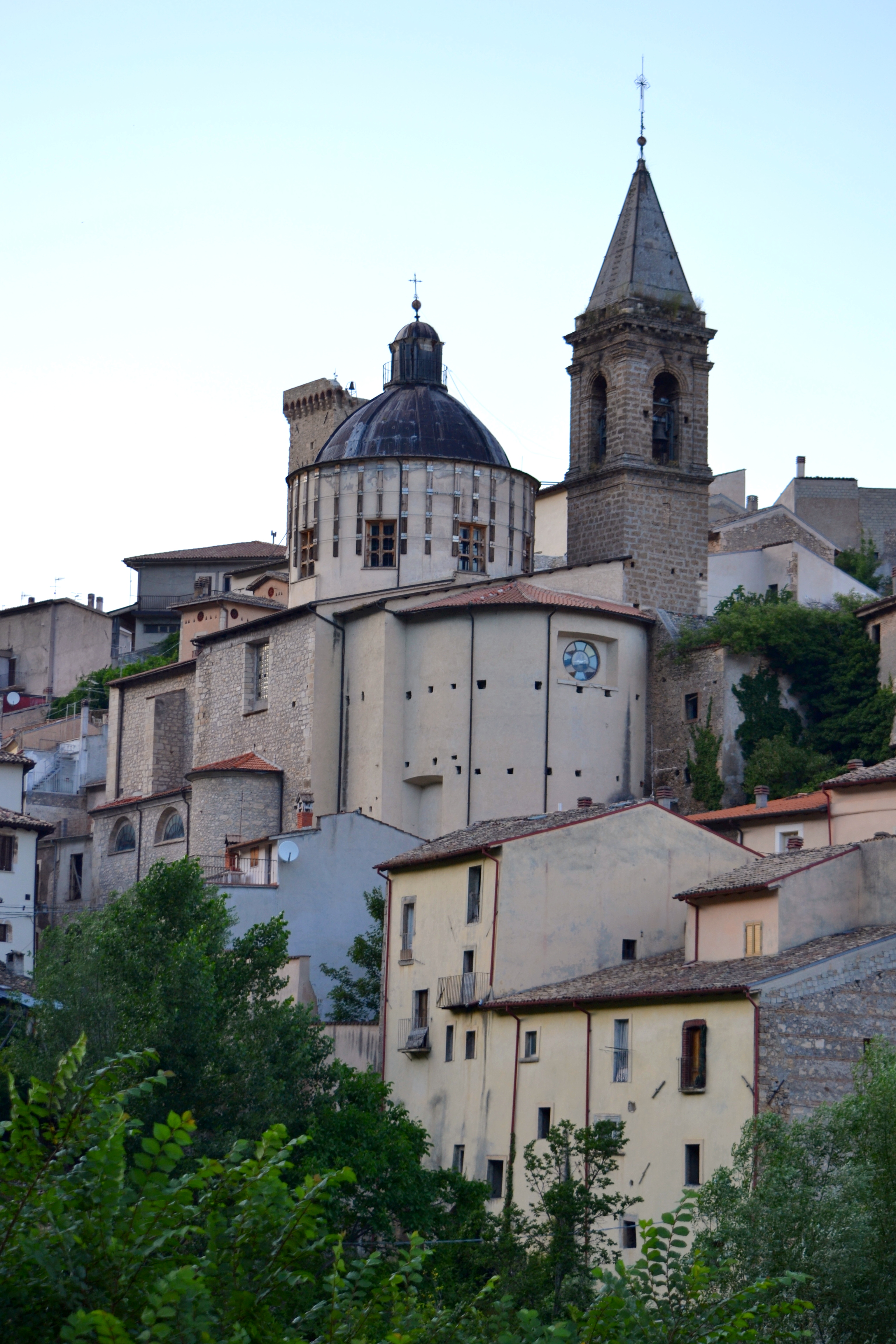 Veduta di Cocullo (AQ)